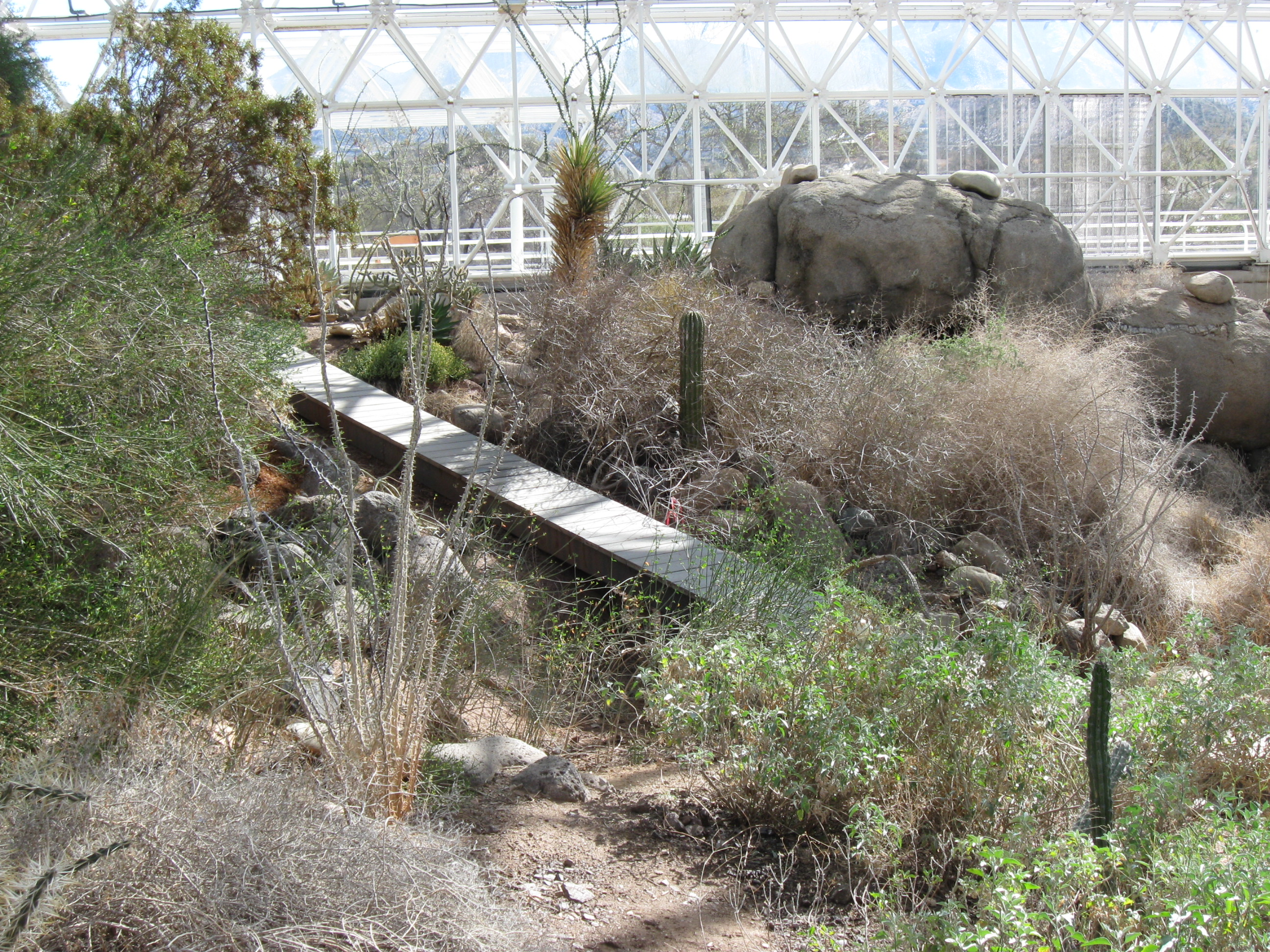 Désert retrouvé à Biosphère 2